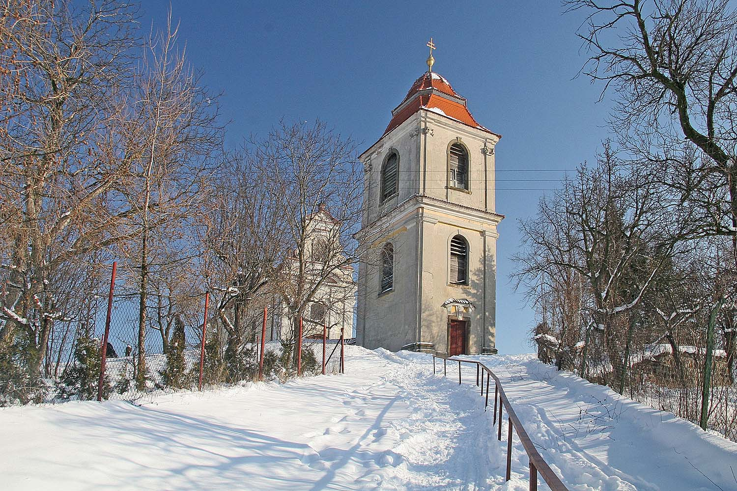 Barokní kostel svatého Václava se zvonicí ve Vrbčanech. district Kolín